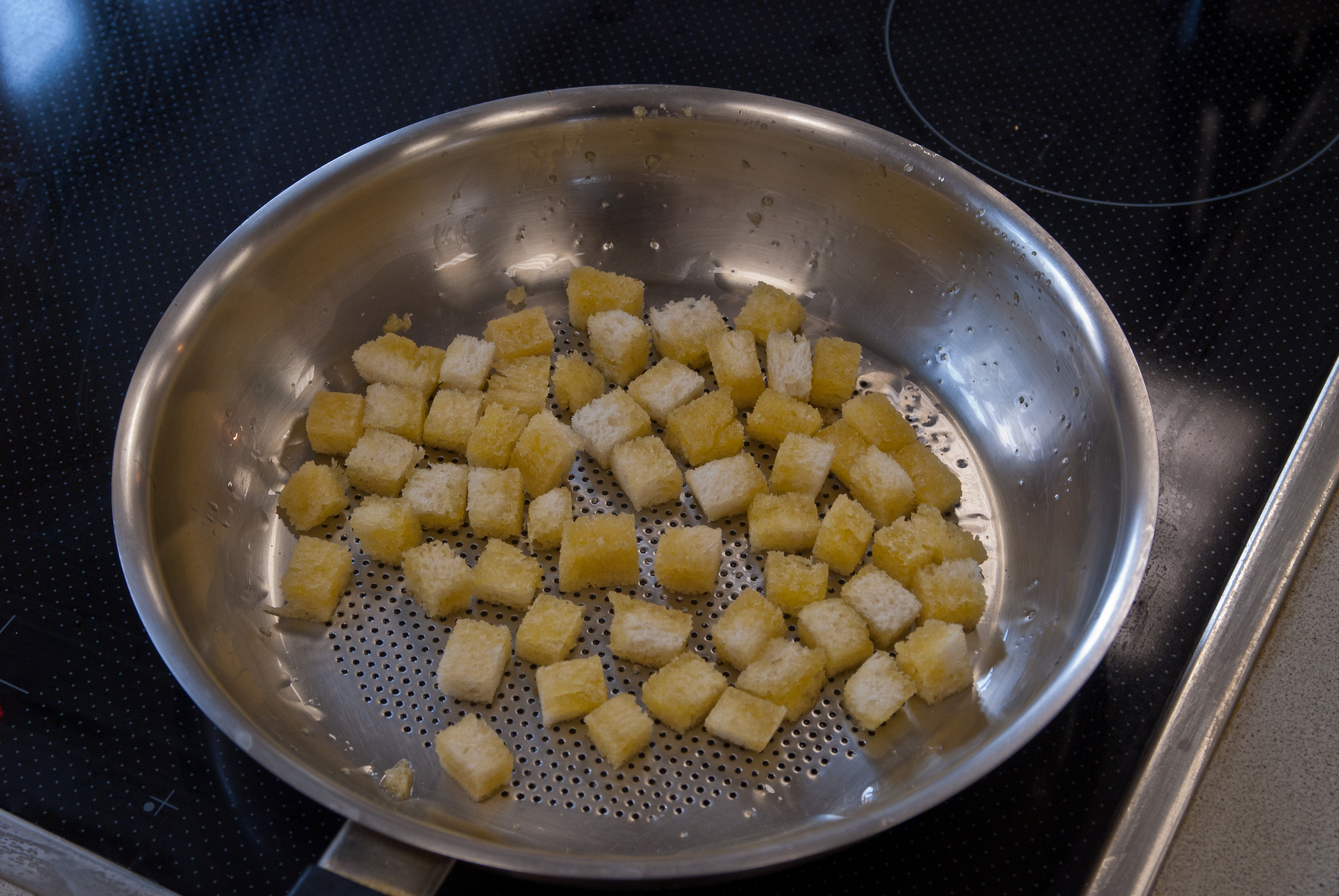 Rösten von entrindendem Toastbrot in Butter für Croutons